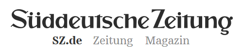 Aktueller Internetauftritt der Süddeutschen Zeitung mit den drei Bereichen SZ.de, Zeitung und Magazin.